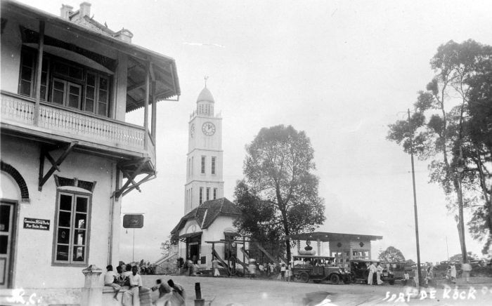 Repronegatief. Stadsgezicht Fort de Kock bij Torenklok, Sumatra's Westkust